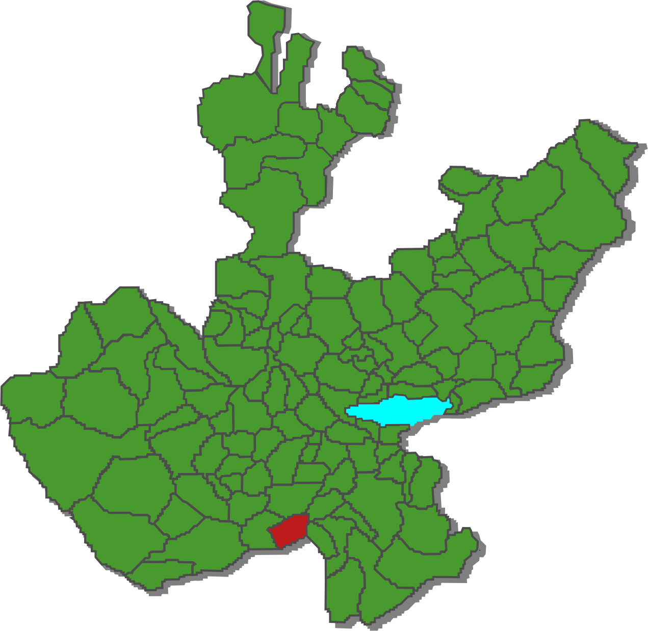 Ubicacion del municpio de Zapotitlan de Vadillo en el mapa de Jalisco